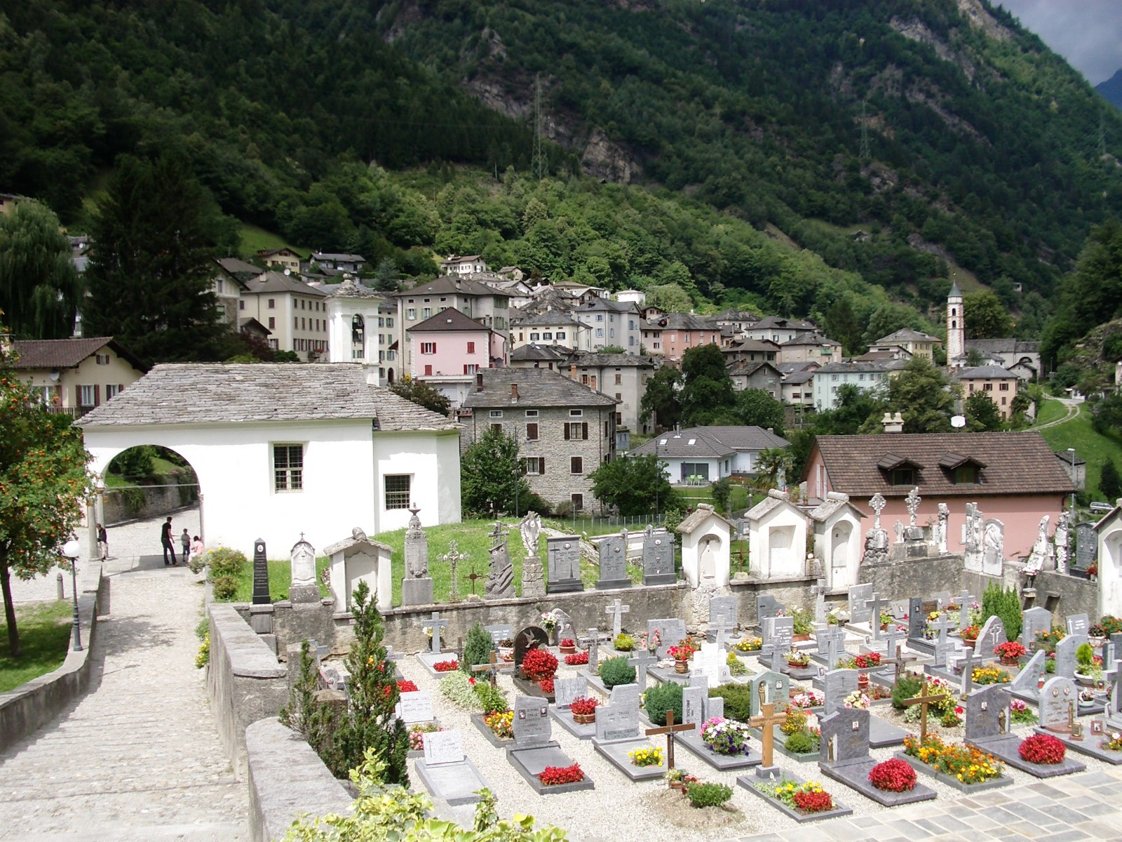 Soazza GR, Switzerland self-made, August 2006